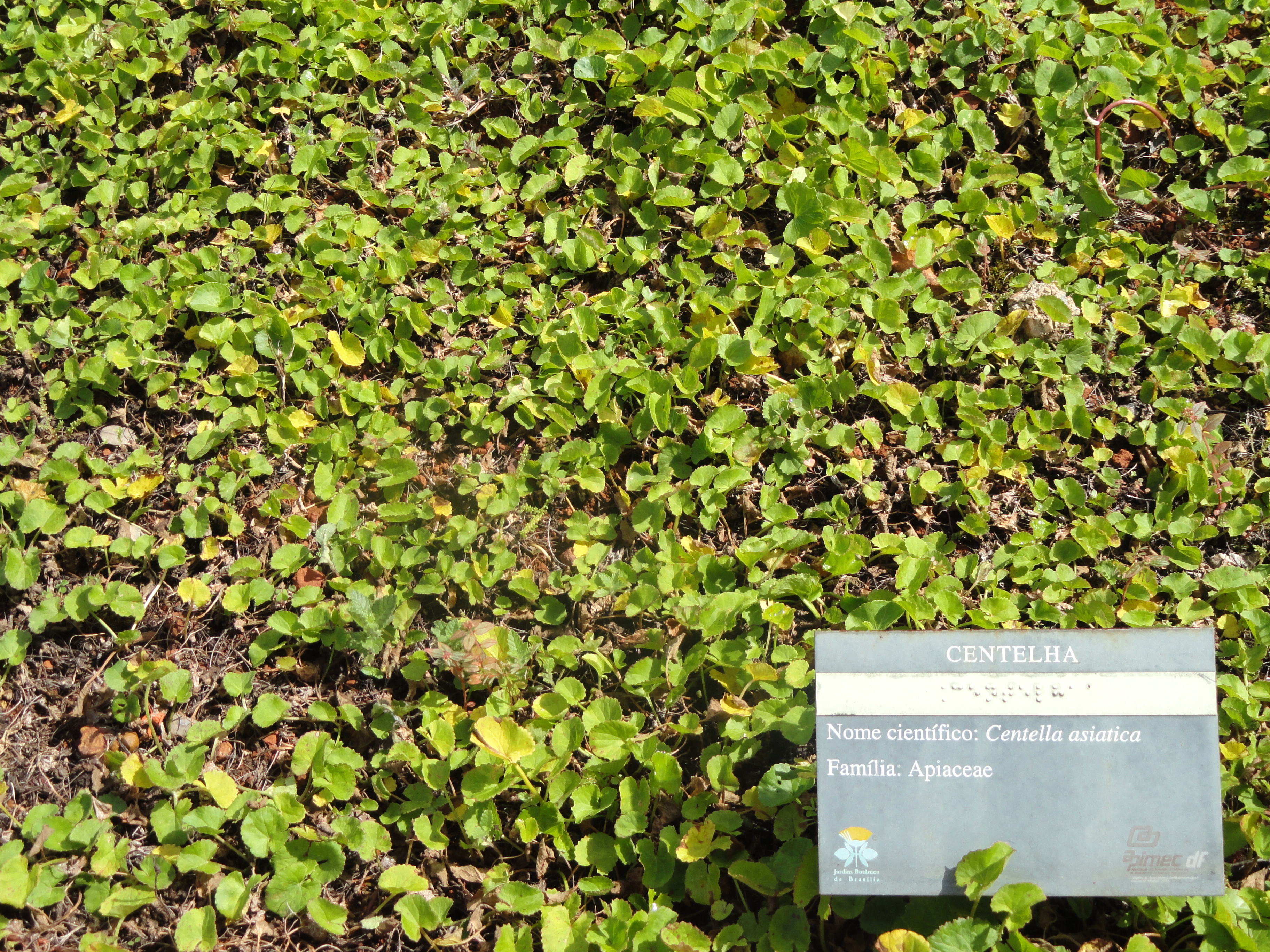 Botanical specimen in the Jardim Botânico de Brasília, Brasília, Brazil.